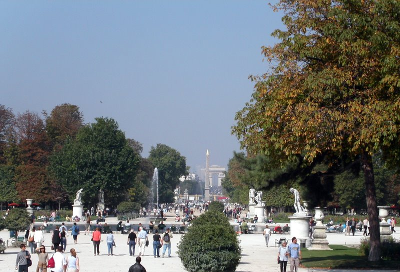 Large round basin and Grande Allée westwards, Grand Carré, Tuileriesgarden, Ier arrondissement, Paris, France.